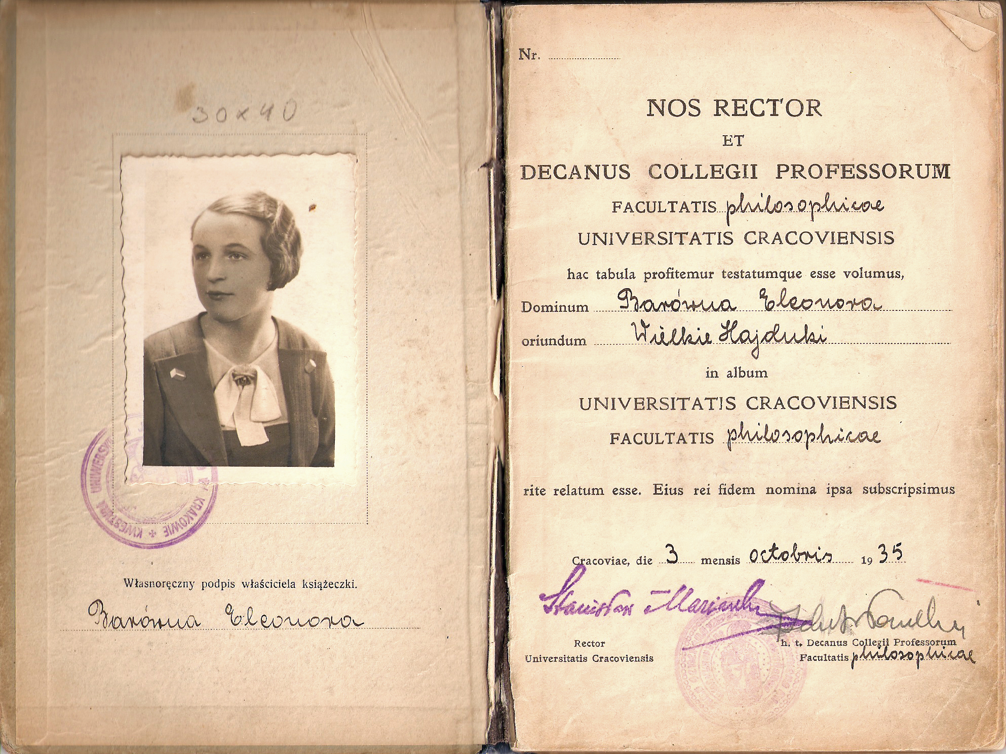 Indeks studentki wydziału filozofii UJ z lat 30. XX w. należący do Eleonory Barówny urodzonej w Wielkich Hajdukach.